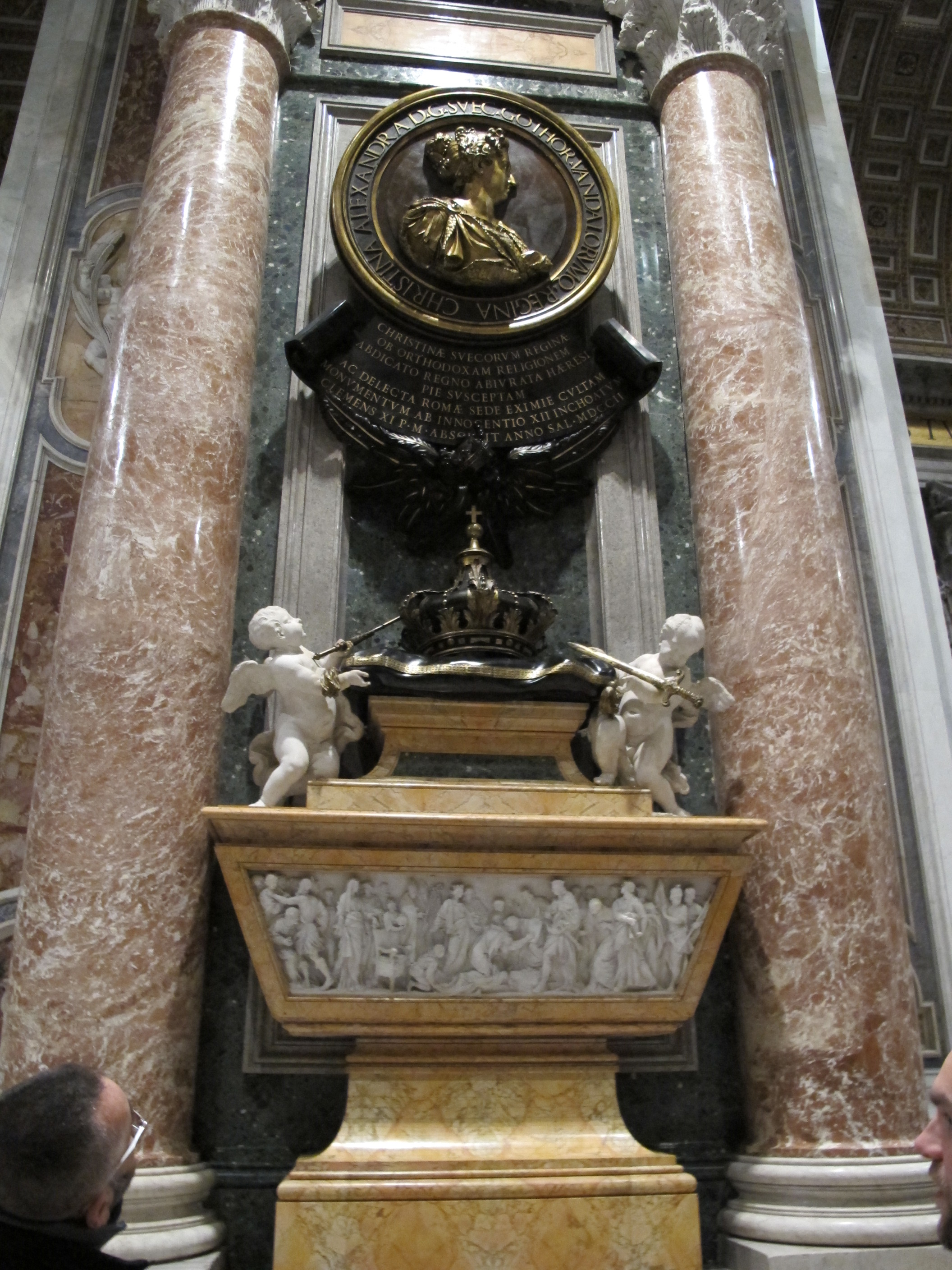 San pietro, tomba di cristina di svezia